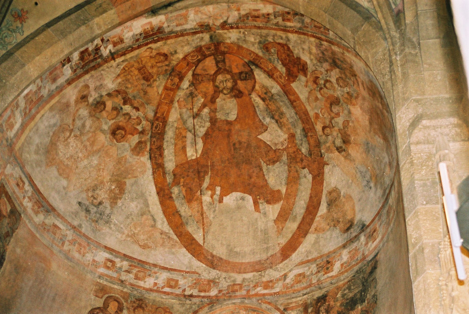 Benediktinerkloster St. Johann, Müstair